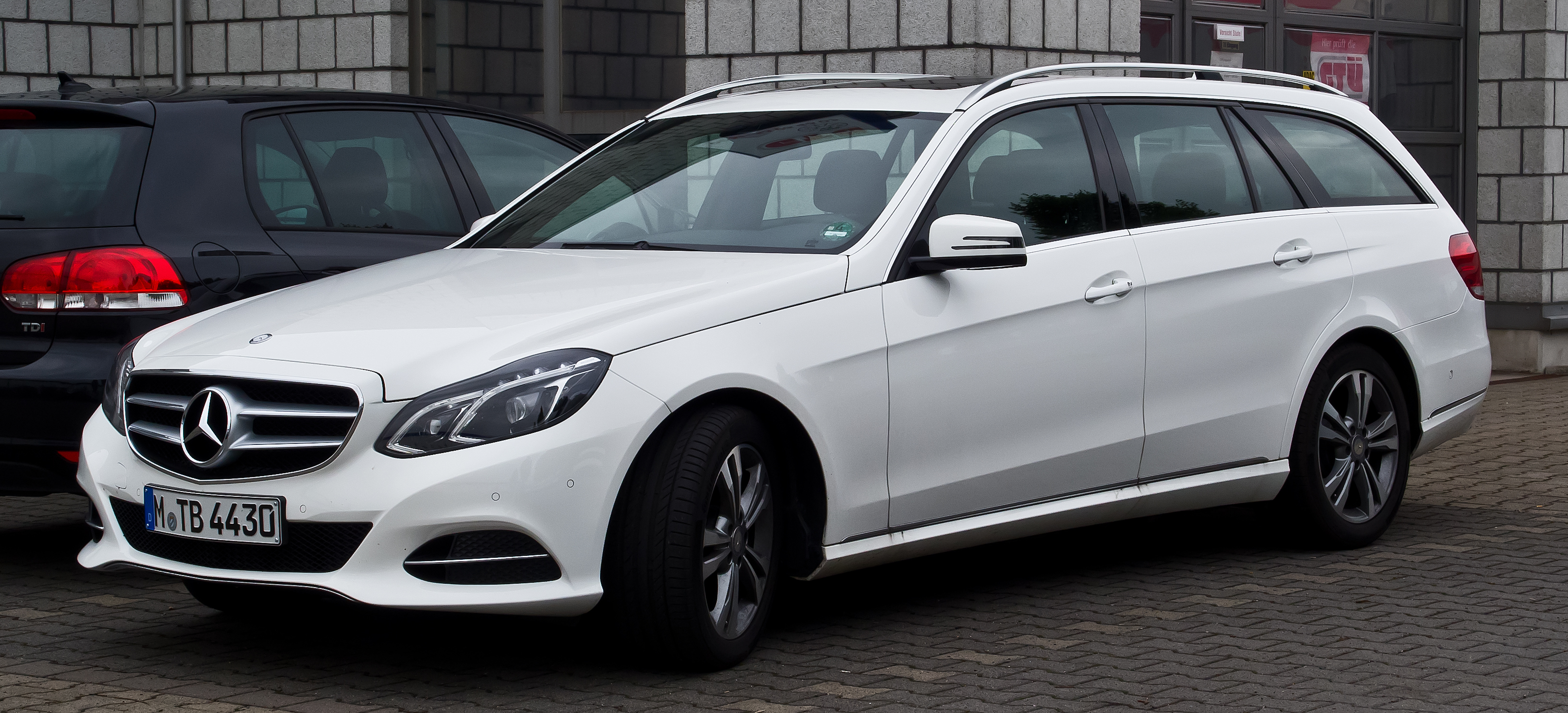 Mercedes-Benz E 220 CDI T-Modell Avantgarde (S 212, Facelift)